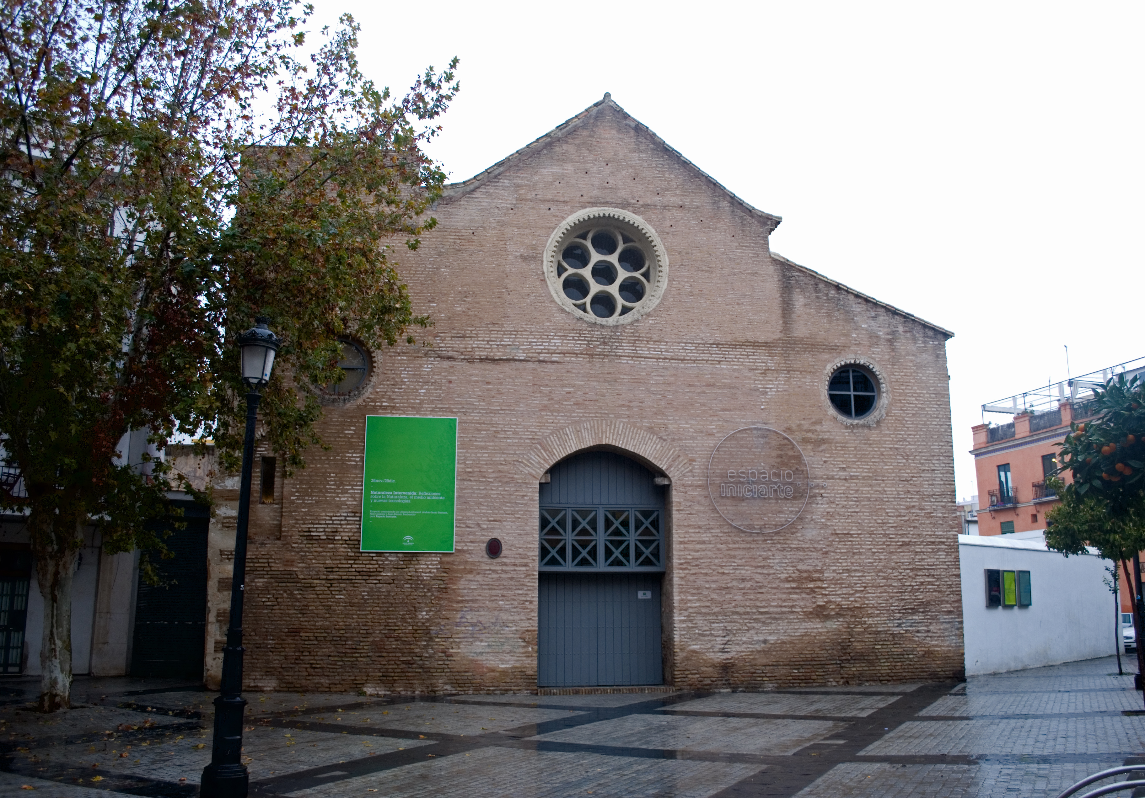 iglesia de Santa Lucía, en Sevilla, construida en el siglo XIV